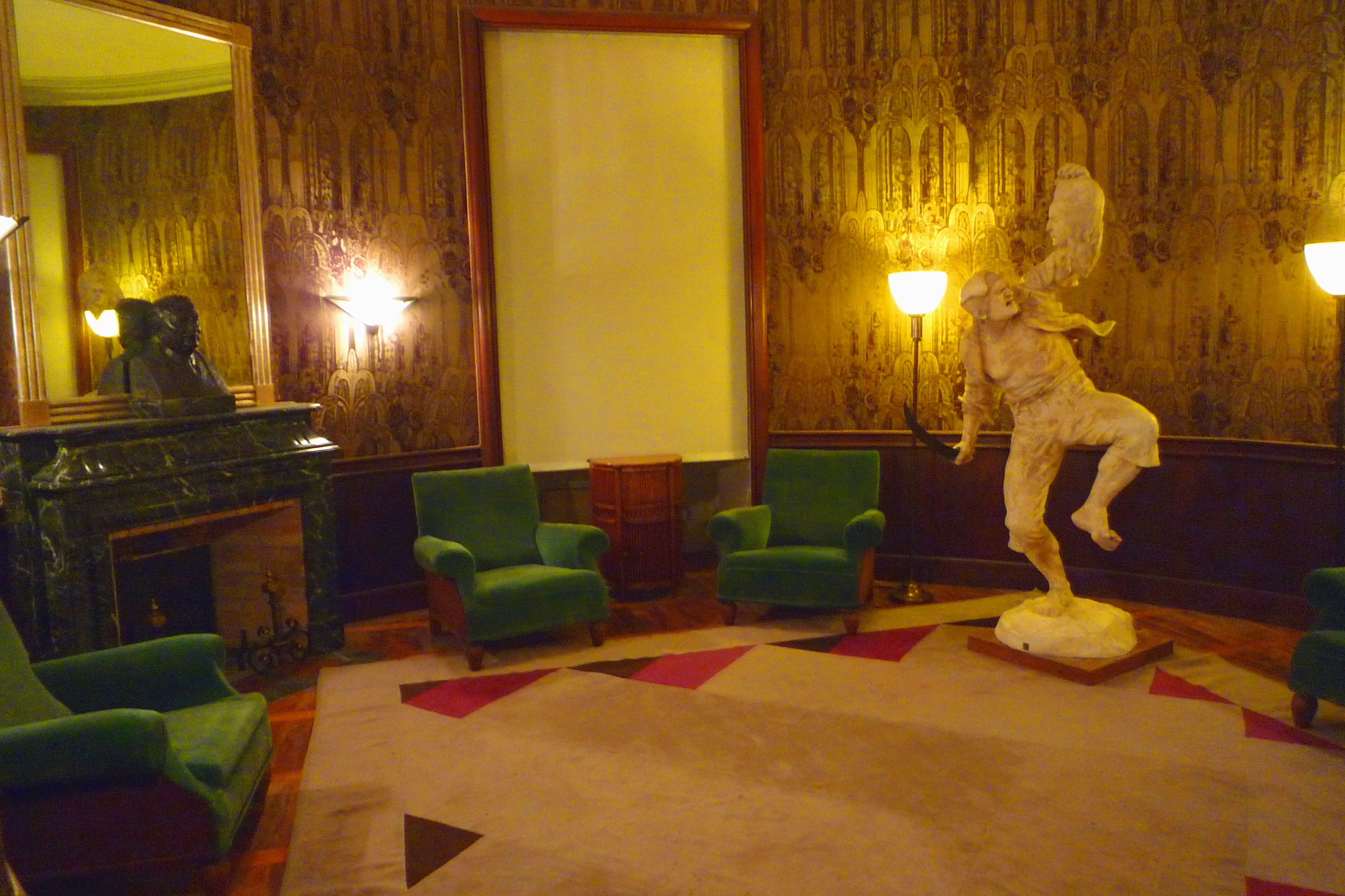 Salle des présidents de la république, niveau 3, Musée de la révolution française - Vizille.